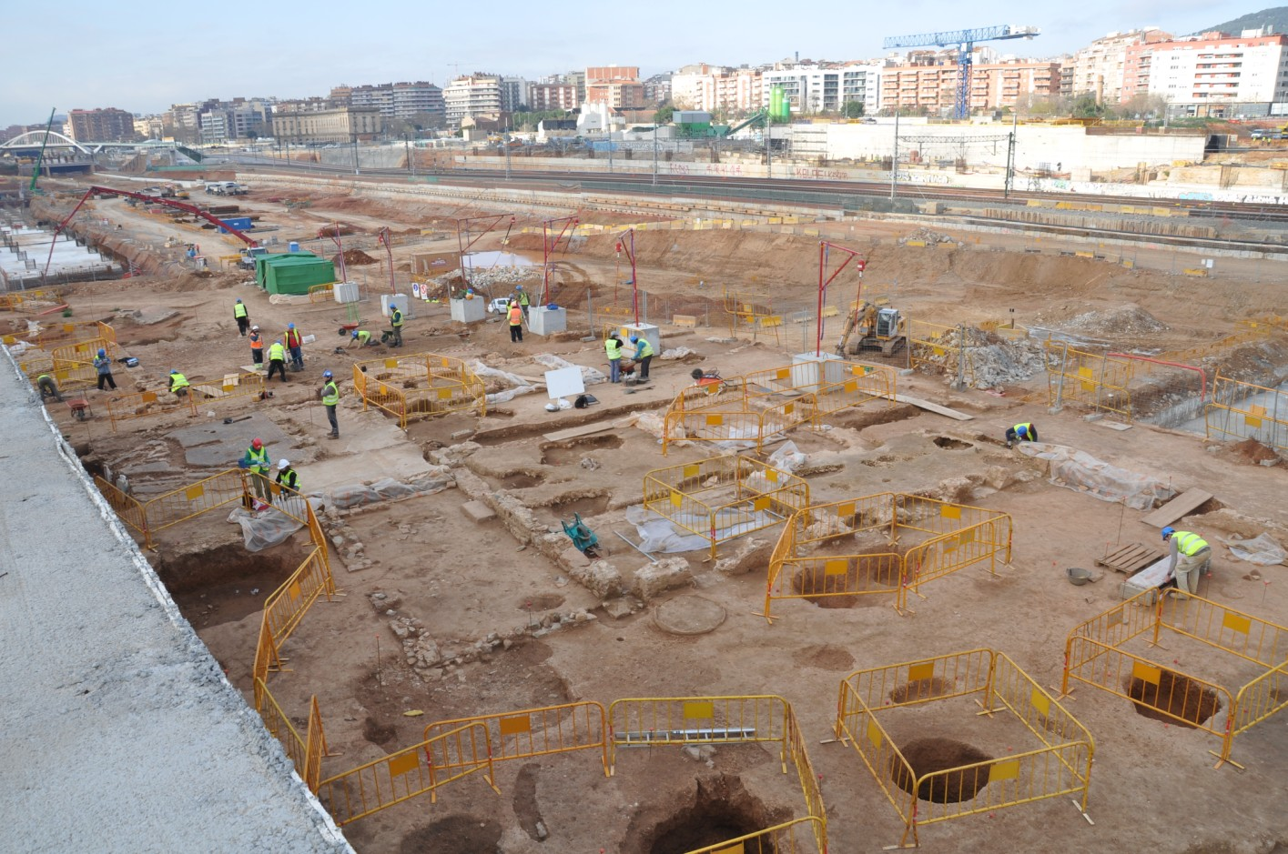 Vista general dels treballs realitzats a la segona fase de la vil·la romana del Pont del Treball Digne (Barcelona). Pars urbana.